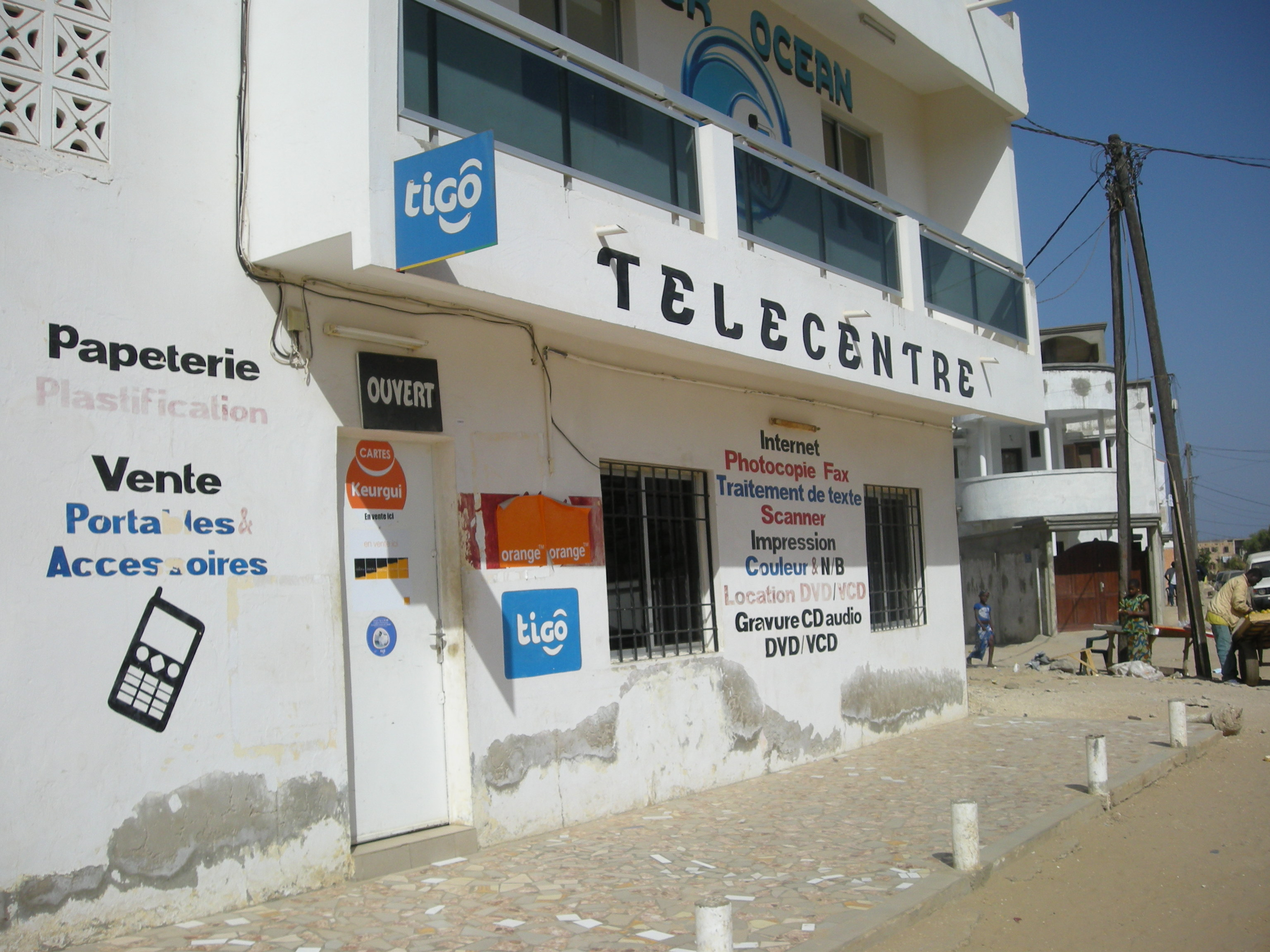 Télécentre à Yoff, Sénégal